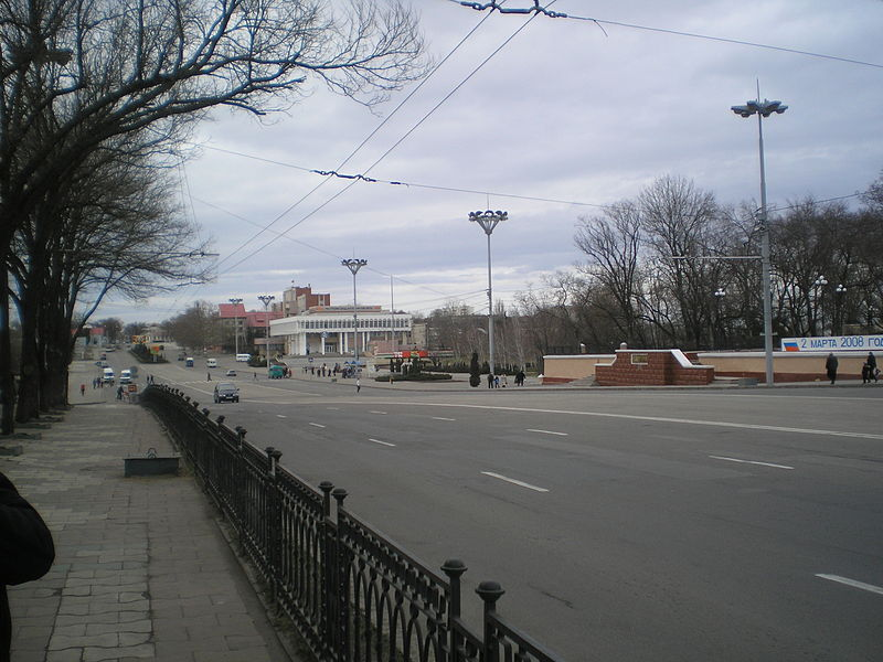 Галоўная вуліца Ціраспаля - вуліца 25 кастрычніка